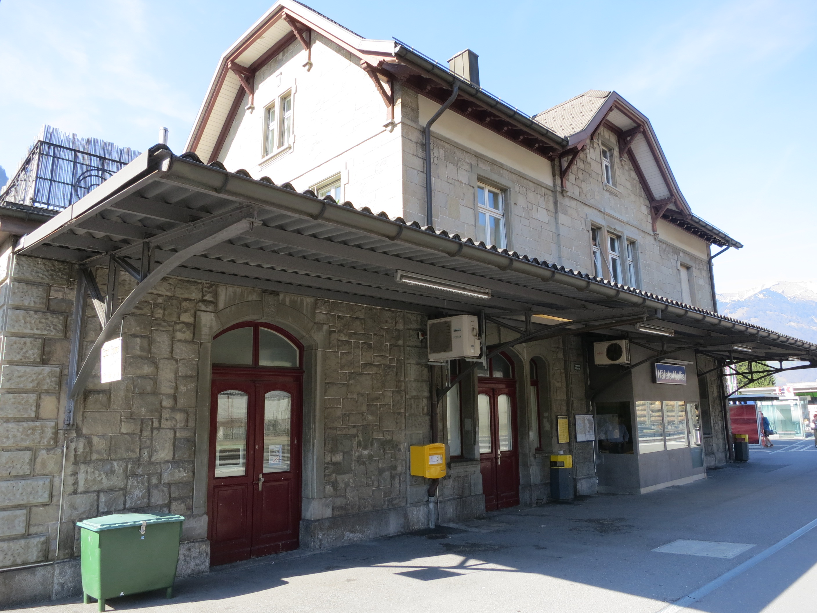 Bahnhof, Näfels GL, Schweiz